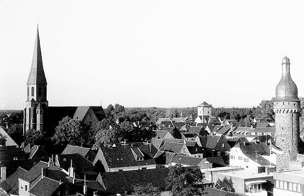 Blick über die Altstadt von Zons (Dormagen, Deutschland); view over the old town of Zons (Dormagen, Germany)